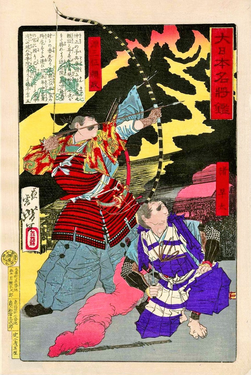 大日本名将鑑源三位頼政猪早太。平家物語に、猪早太は源頼政のヌエ退治に同行し頼政が射落としたヌエに止めを刺したとある